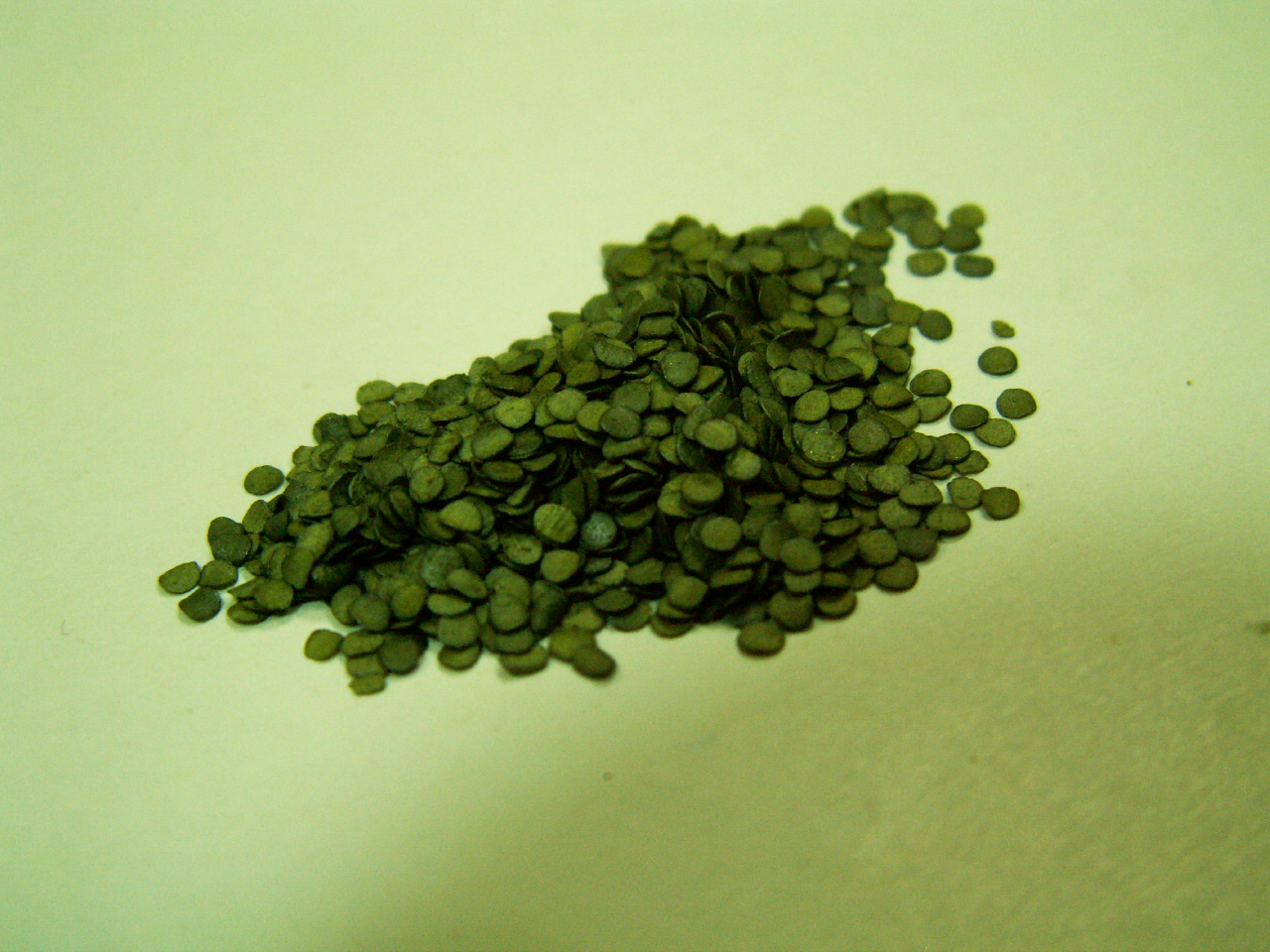 Brezdimni smodnik za šibrenice v kosmičih, Avtor: Rude